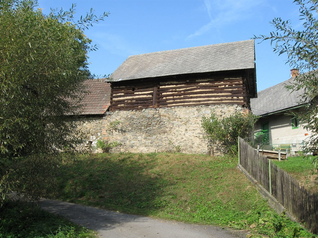 Petrov, Bohuliby č. p. 3, okres Praha-západ. Venkovská usedlost (do památkové ochrany nespadá stodola).